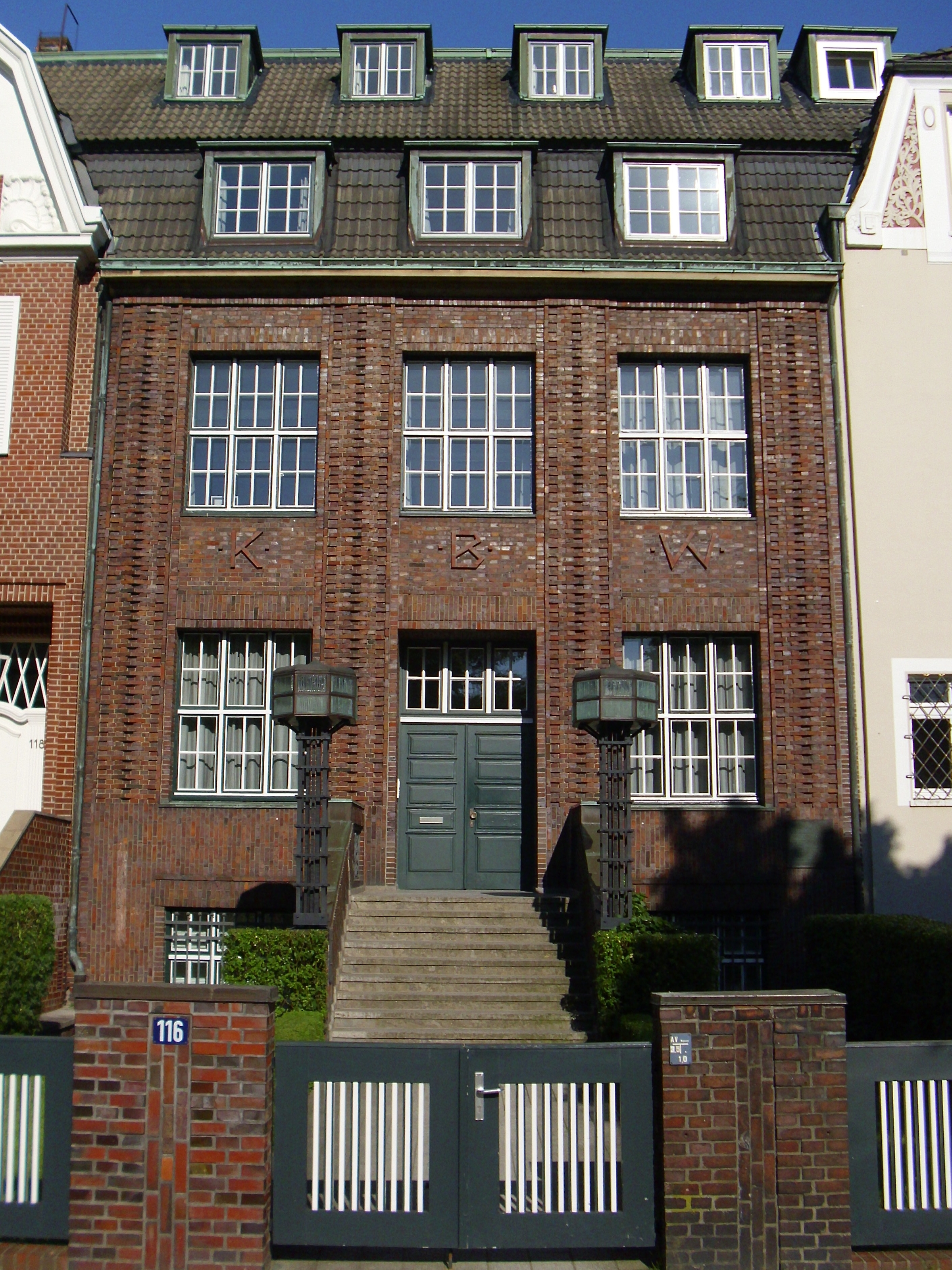 Ehemalige Kulturwissenschaftliche Bibliothek Warburg, Heilwigstraße 116 This is a photograph of an architectural monument.